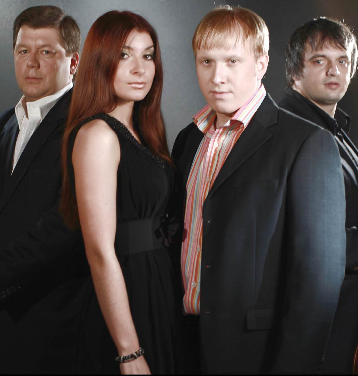 Музыкальный коллектив «Рядовой Дарин»